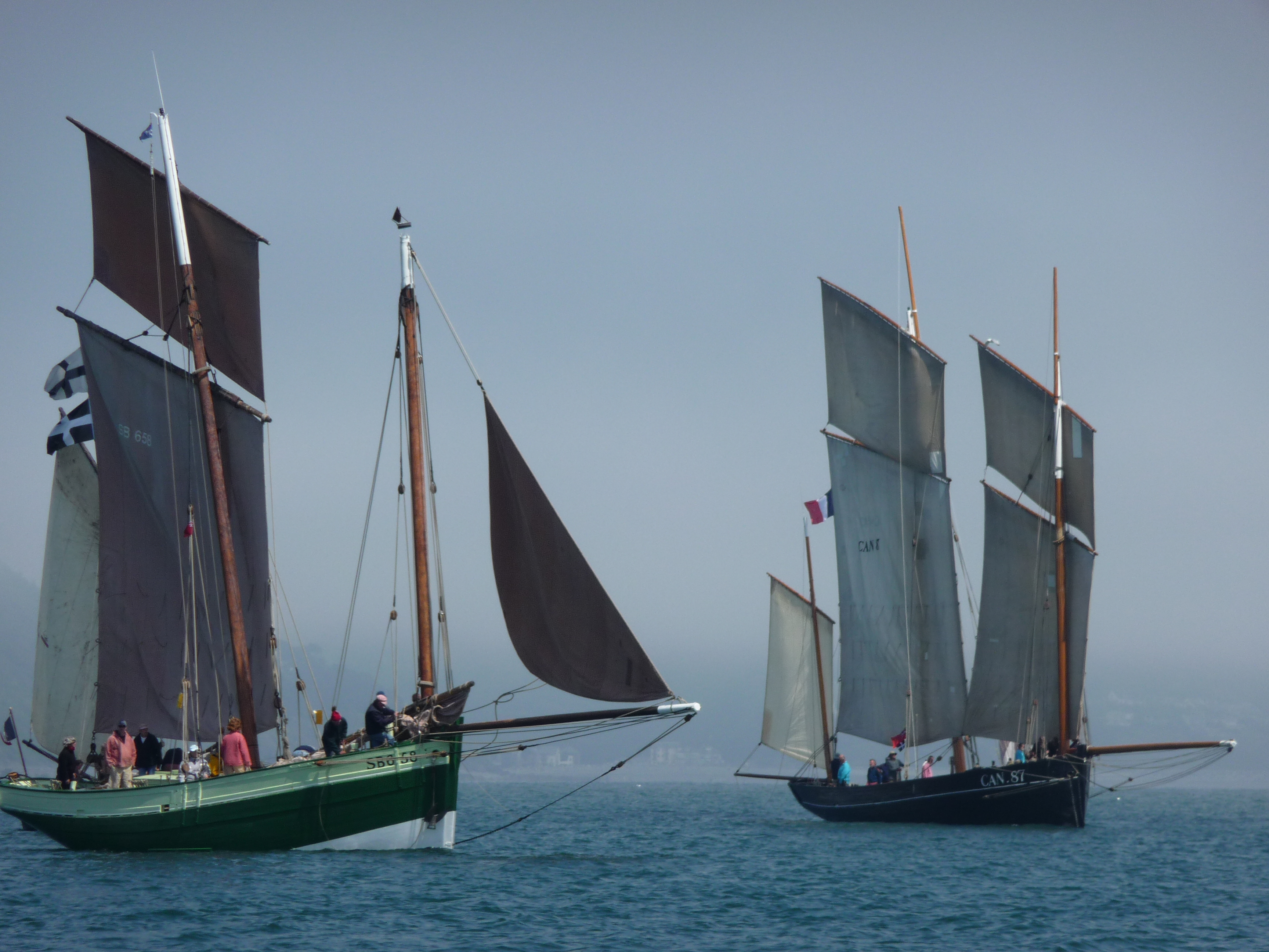 Luggers at Looe Bay